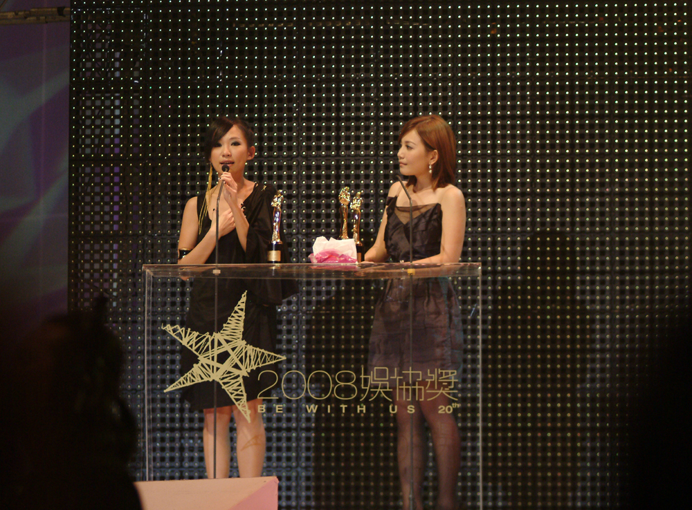 宇珩寫給梁靜茹的歌《會呼吸的痛》榮獲2008馬來西亞娛協獎十大金曲。